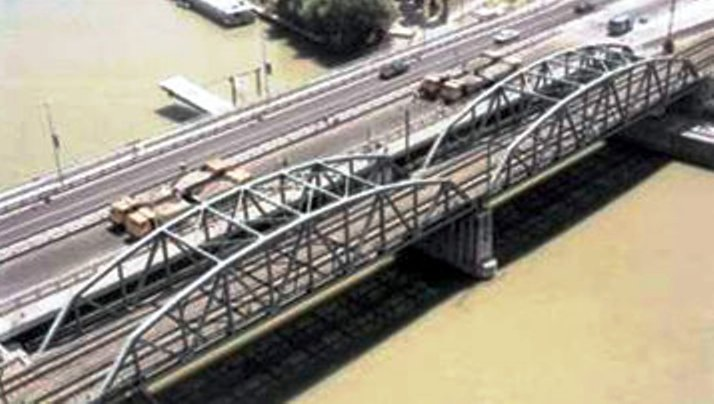 Kvassay híd a kiszélesítés után